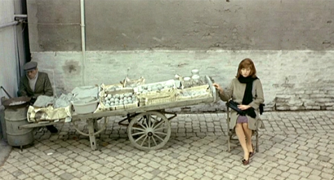 Monica Vitti (mint Giuliana) a Vörös sivatag (Il deserto rosso / Le désert rouge) c. olasz-francia filmben, rendezte Michelangelo Antonioni, 1964